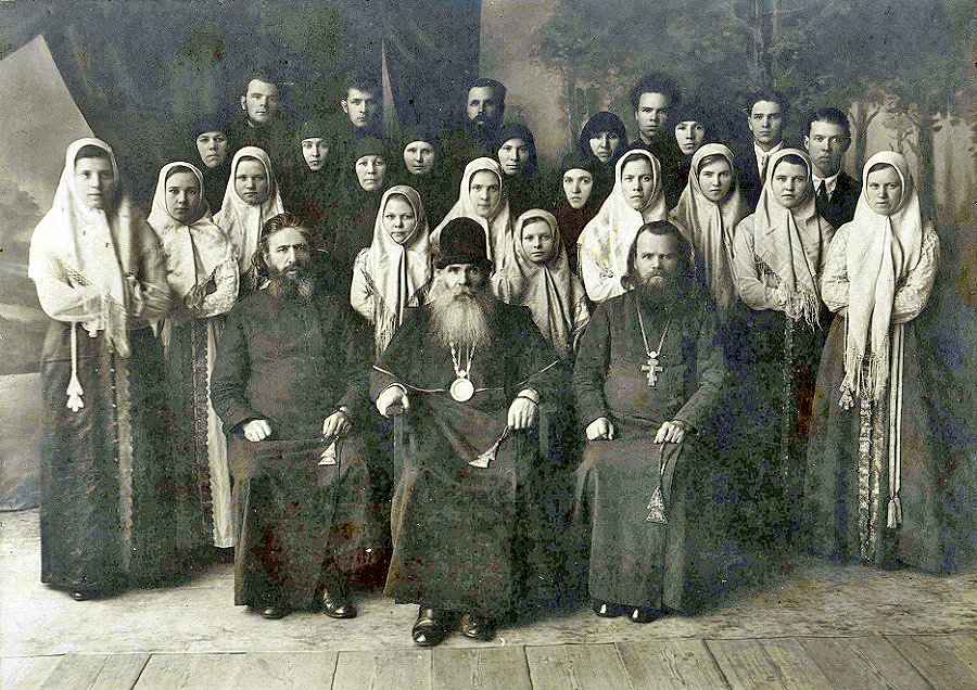 Миасс, группа прихожан. Слева от епископа Андриана сидит о. Роман Топорков